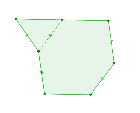 Для зоногона достаточно требовать равенства и параллельности сторон во всех парах противоположных, кроме одной, но разделить отсутствие этих двух требований по двум разным парам нельзя.